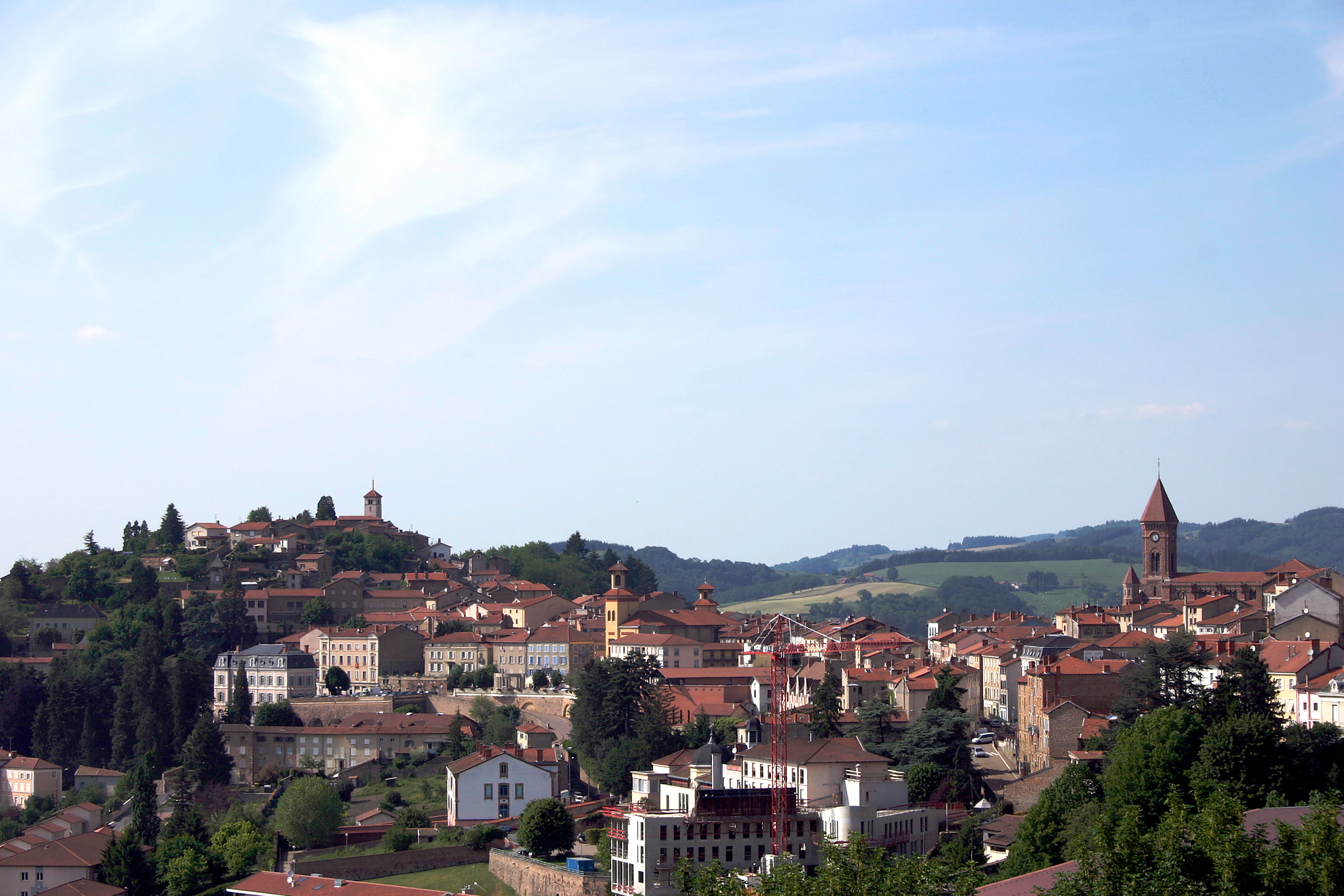 Vue des trois clochers de Thizy (Chapelle Saint-Georges, Hôtel de Ville et Notre-Dame)